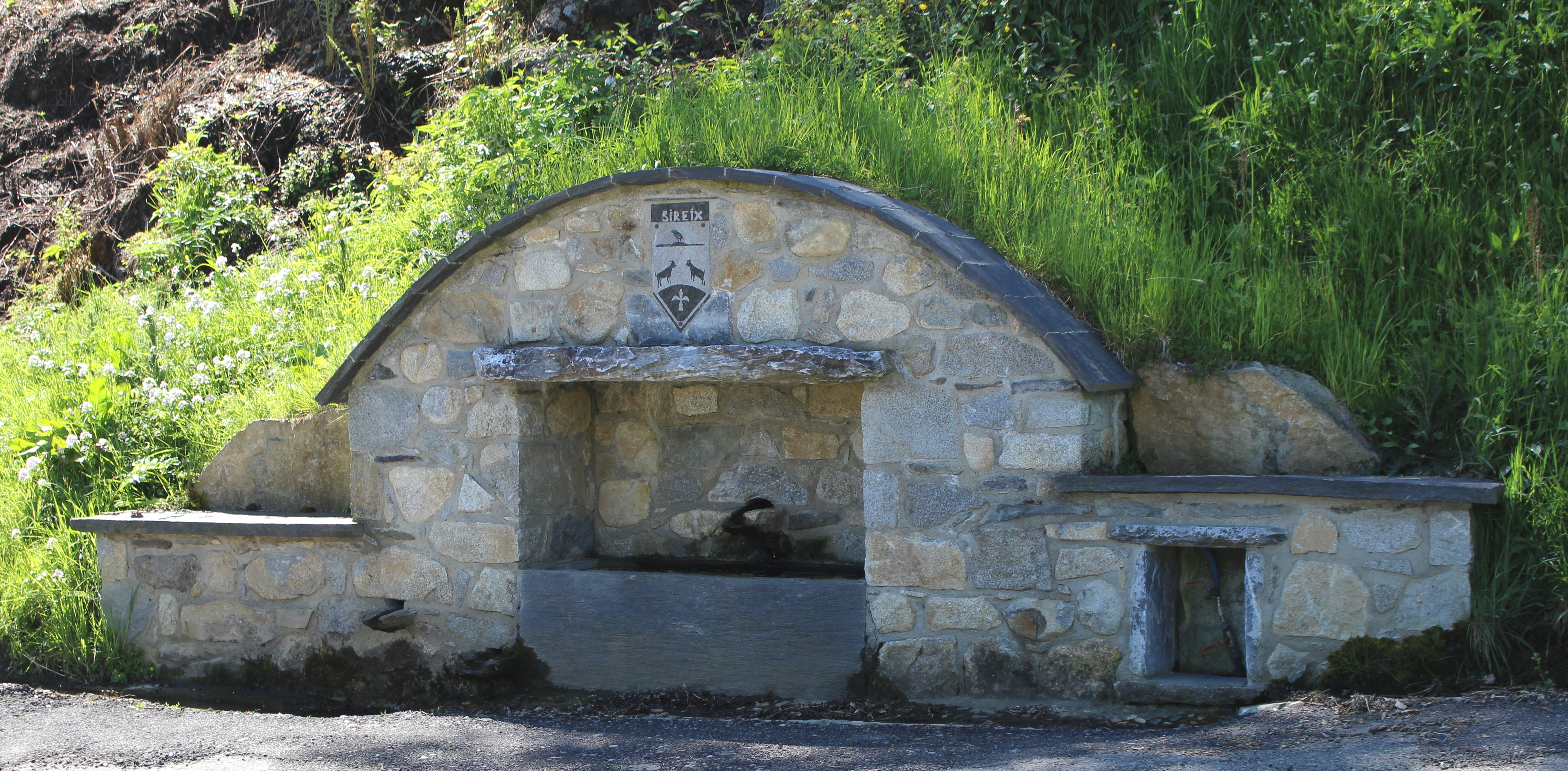 Fontaine de Sireix (Hautes-Pyrénées)